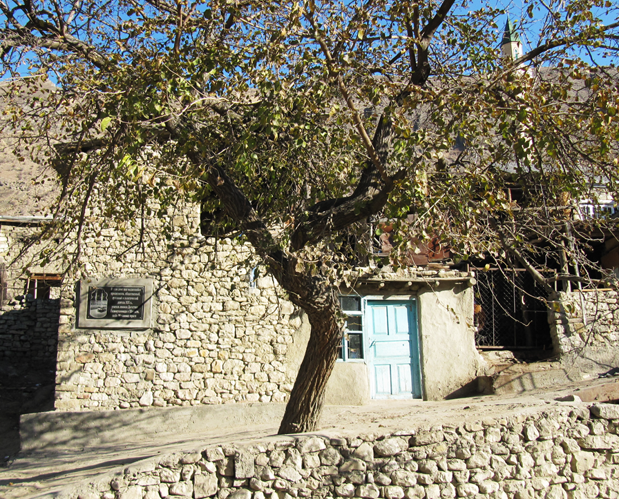 Дом шейха Мухаммада Ярагского в селении Балахани унцукульского района